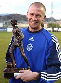 Лукаш Гартиг